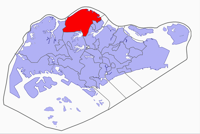 Singapore electoral map, 2006